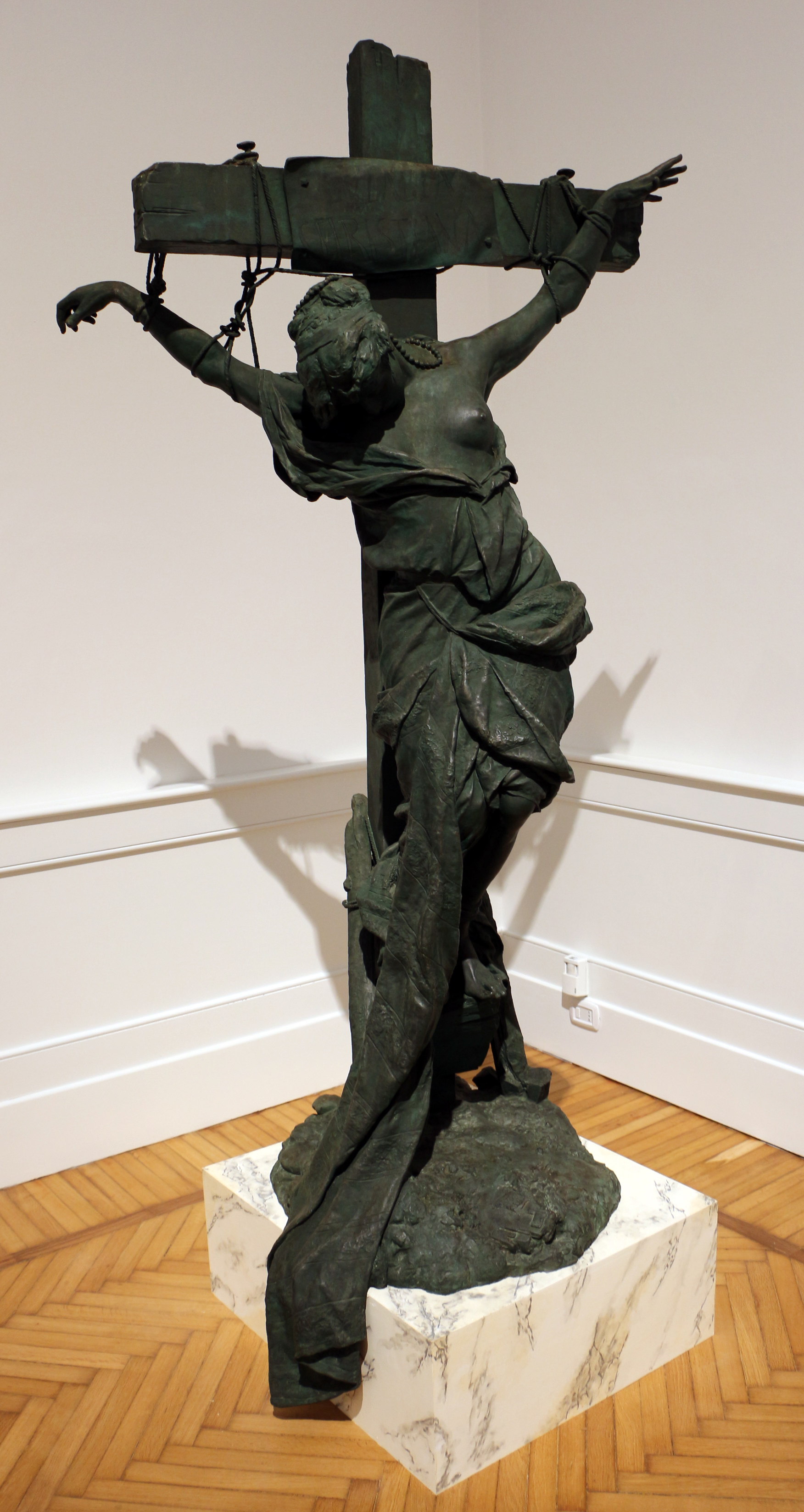 Sculptures in the Galleria nazionale d'arte moderna (Rome) This is a photo of a monument which is part of cultural heritage of Italy.